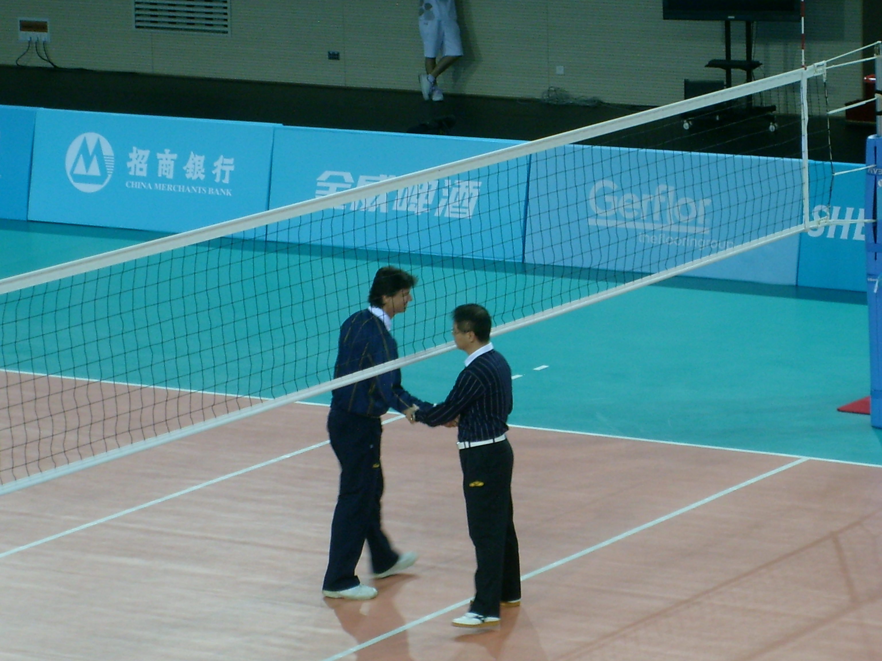 深圳大运男子排球赛裁判员